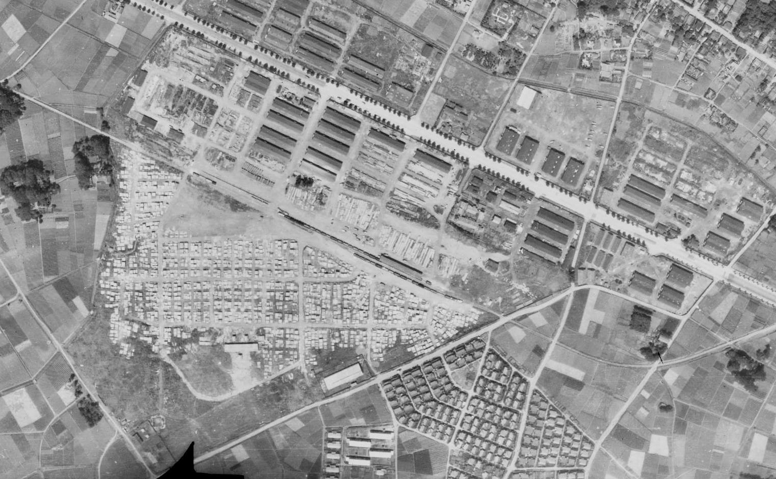 The copyright holder of this file, the Ministry of Land, Infrastructure, Transport and Tourism of Japan, allows anyone to use it for any purpose, provided that the copyright holder is properly attributed. Redistribution, derivative work, commercial use, and all other use is permitted. Attribution: Copyright © National Land Image Information (Color Aerial Photographs), Ministry of Land, Infrastructure, Transport and Tourism This image is copyrighted by the Ministry of Land, Infrastructure, Transport and Tourism of Japan. For terms of use, see the stipulation to use of National Land Information (in Japanese) and message from MLIT (in Japanese and English). When you display this image on an article, include the following phrase in the description: "Made based on [ National Land Image Information (Color Aerial Photographs)], Ministry of Land, Infrastructure, Transport and Tourism".